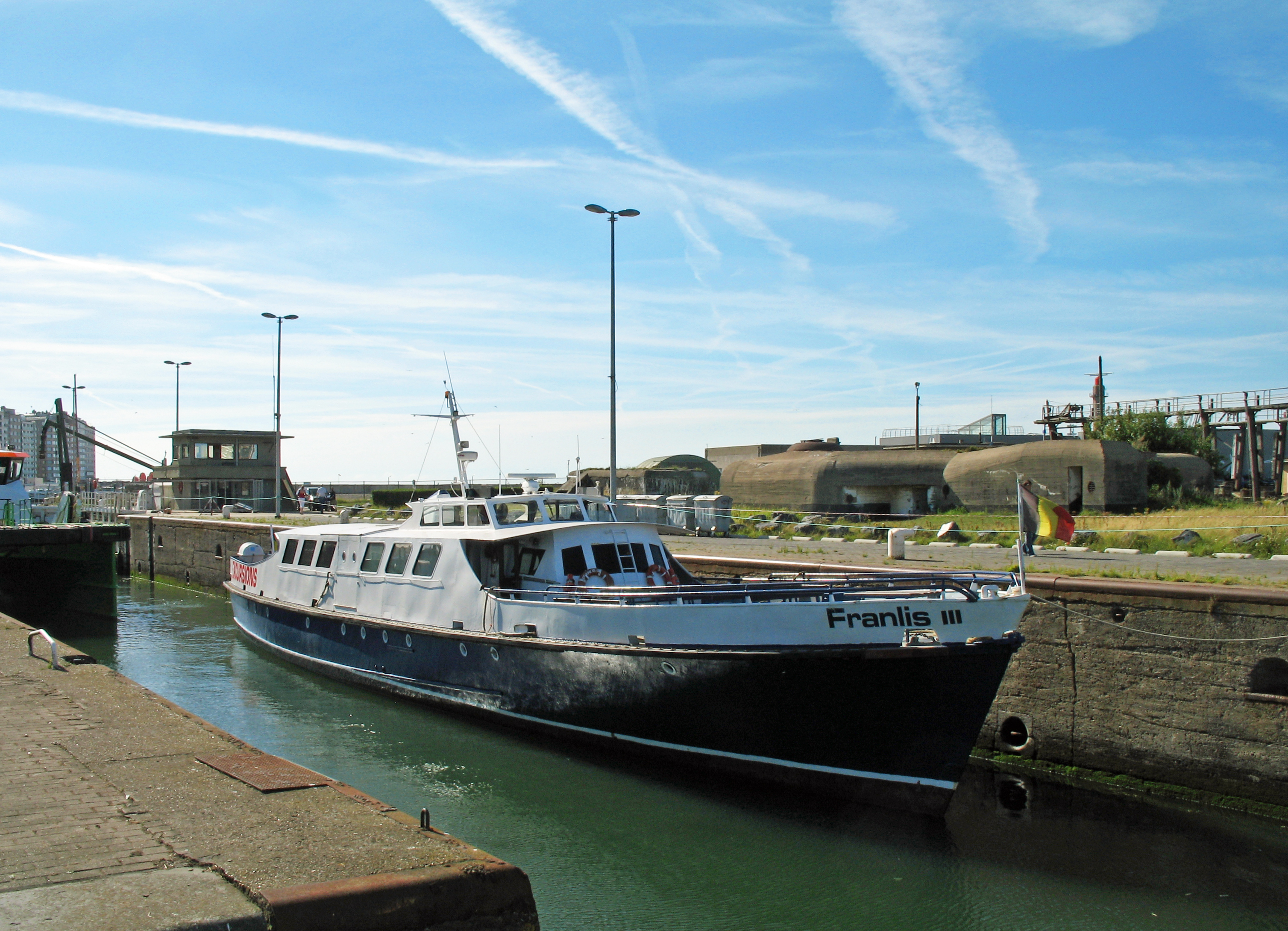 De Belgische excursieboot Franlis III van rederij Franlis in de haven van Oostende (België). Omgebouwd snel patrouillevaartuig uit de Tweede Wereldoorlog, mogelijk RCN Motor Launch Q118 van de Canadese marine, gebouwd in 1943.